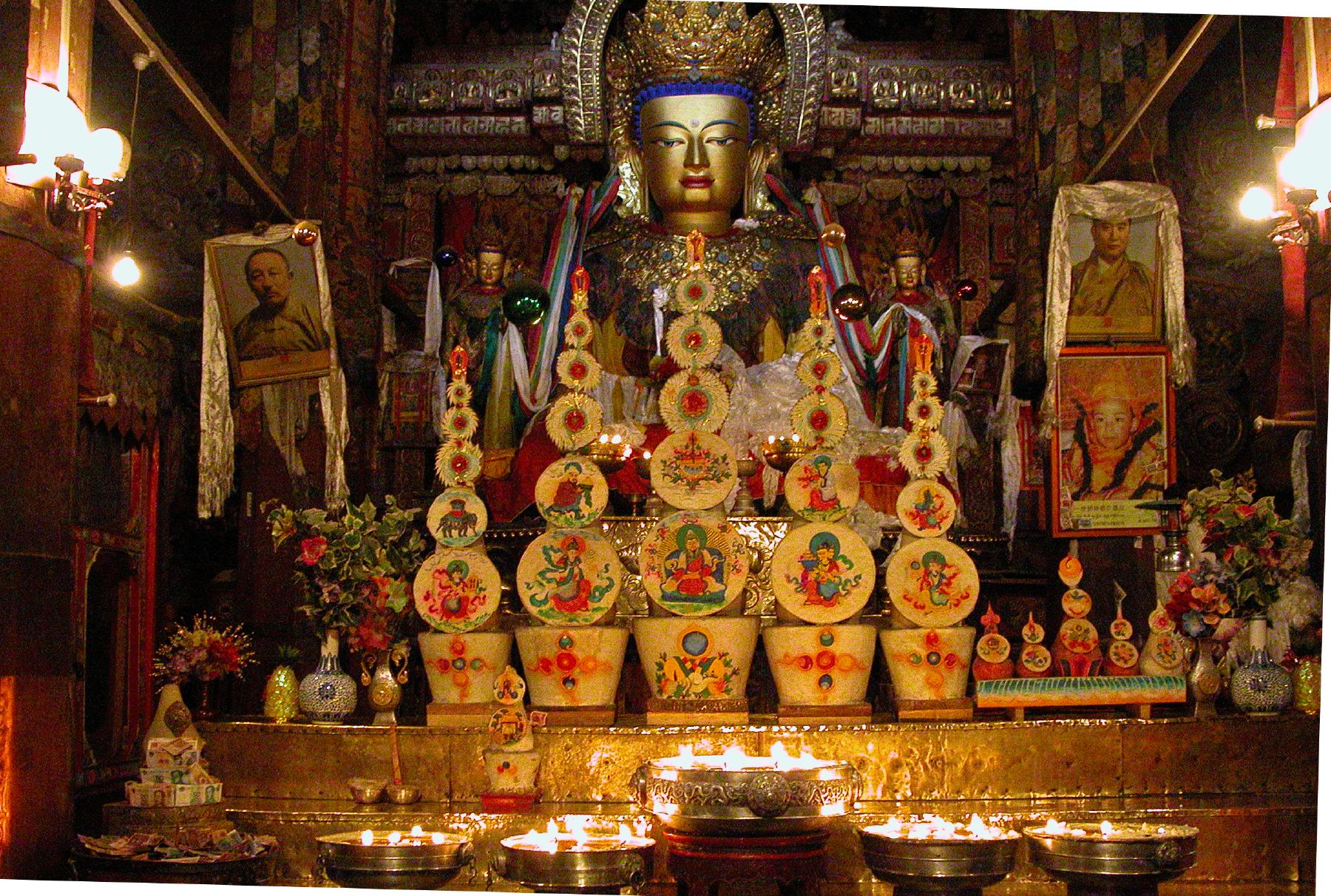 Autel dédié au Panchen Lama au Tibet.Place of worship